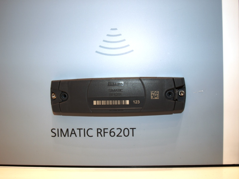 Siemens SIMATIC RF620T (RFID-tag)